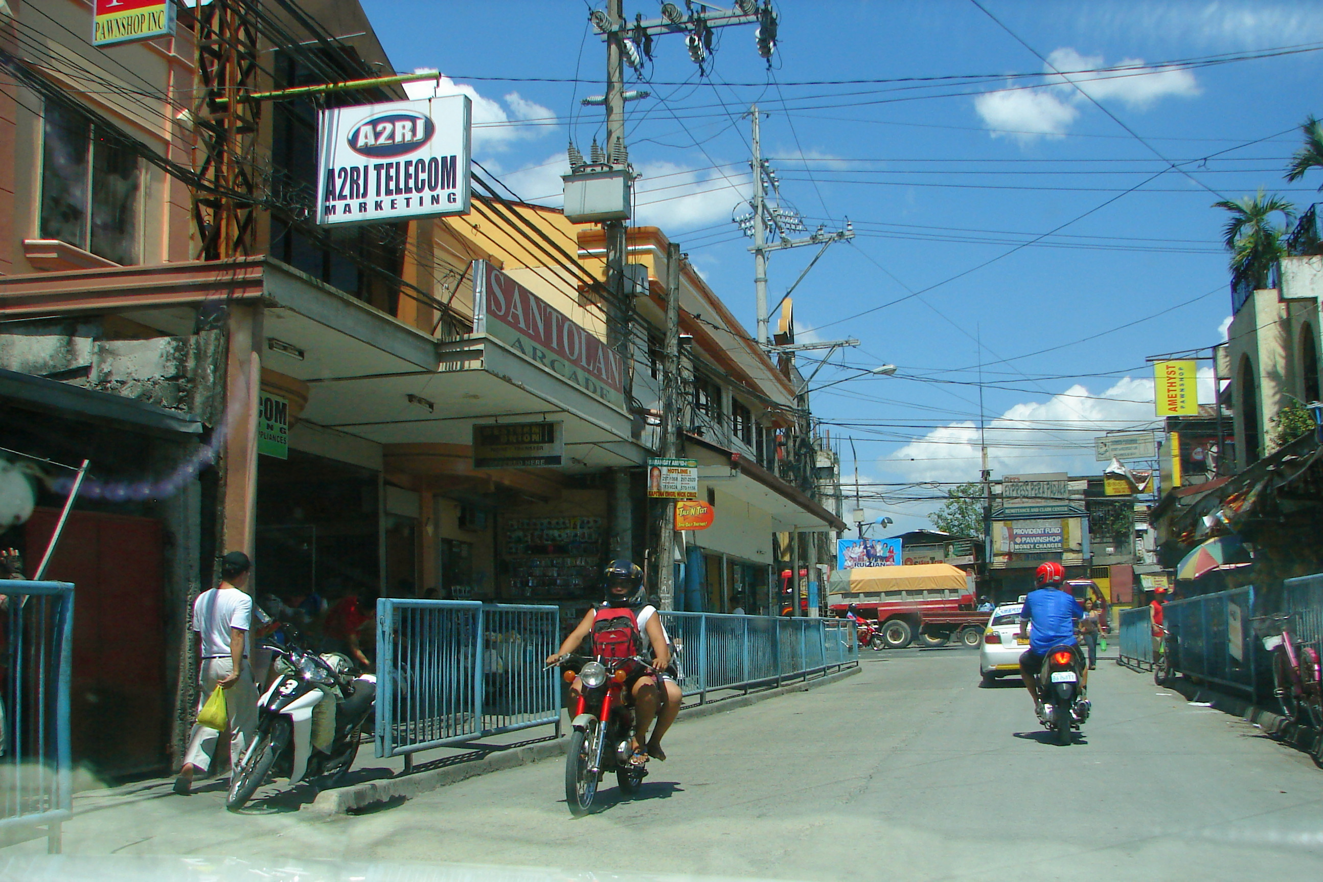 E. de los Santos Street approaching General Antonio Luna Avenue in San Mateo, Rizal, Philippines